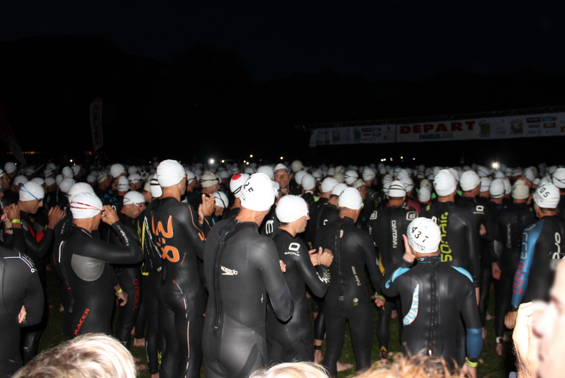 Depart nocturne Embrunman 2014